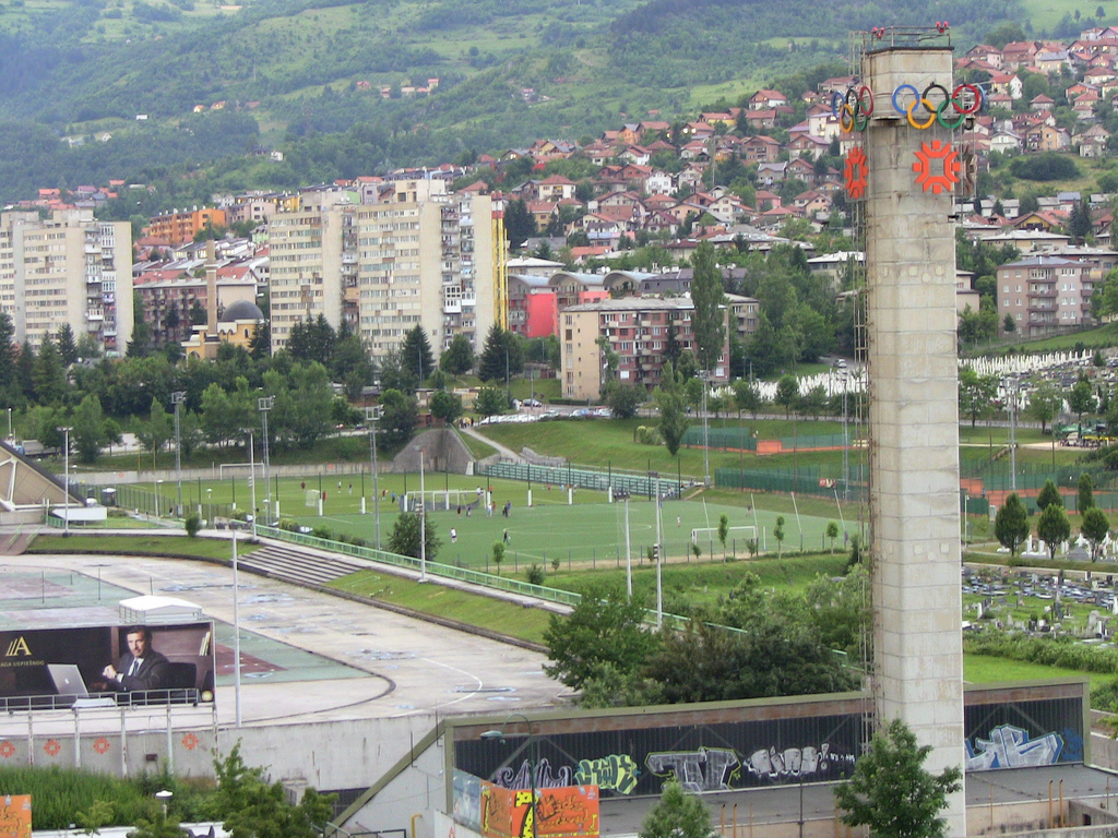 IMG_9511 Sarajevo olympics